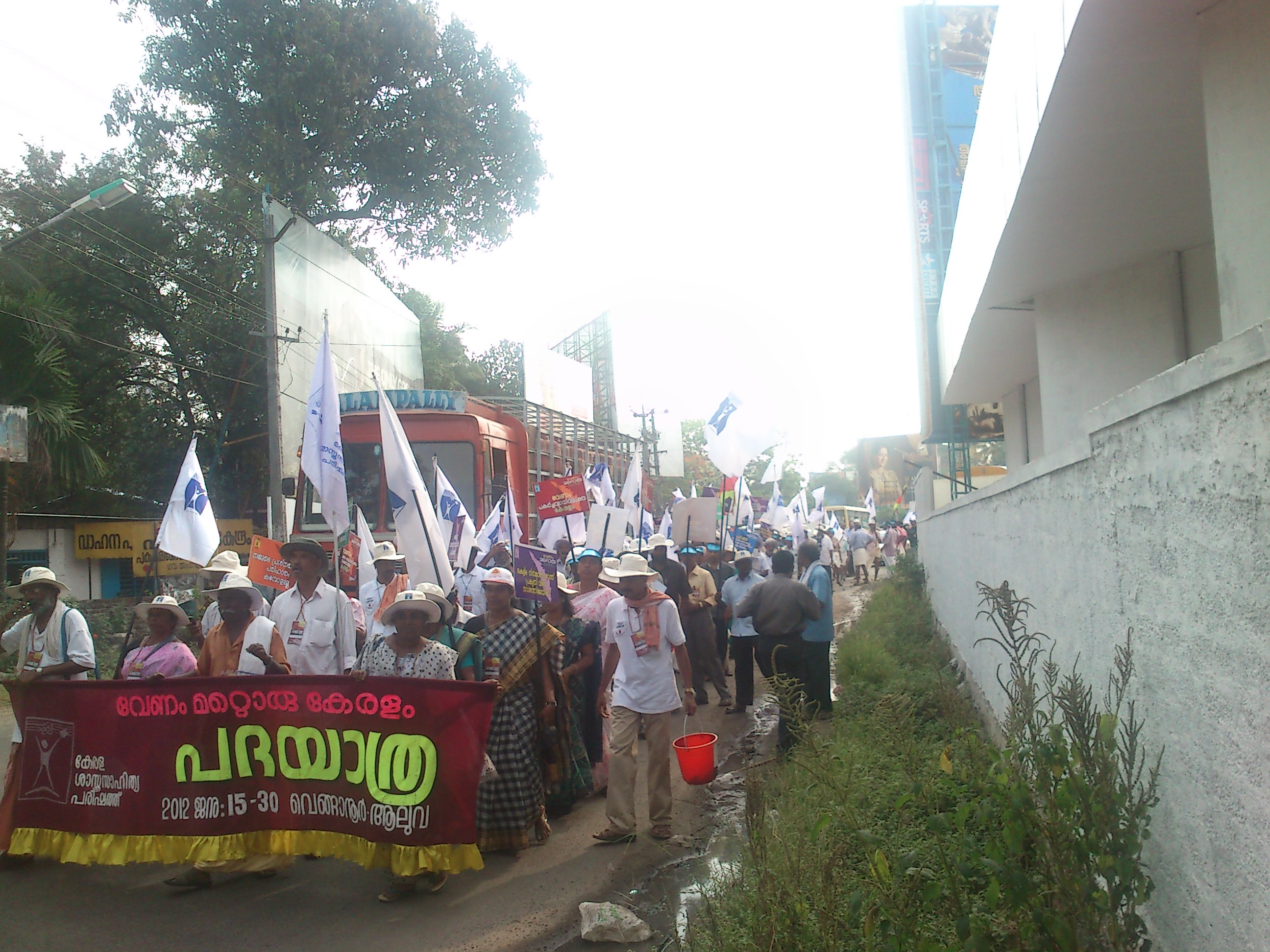 കേരള ശാസ്ത്രസാഹിത്യ പരിഷത്തിന്റെ വേണം മറ്റൊരു കേരളം - സാമൂഹിക വികസന പദയാത്ര ആലുവയില്‍ പ്രവേശിക്കുന്നു.